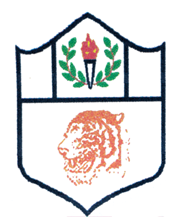 Escudo de Tecoanapa (municipio)